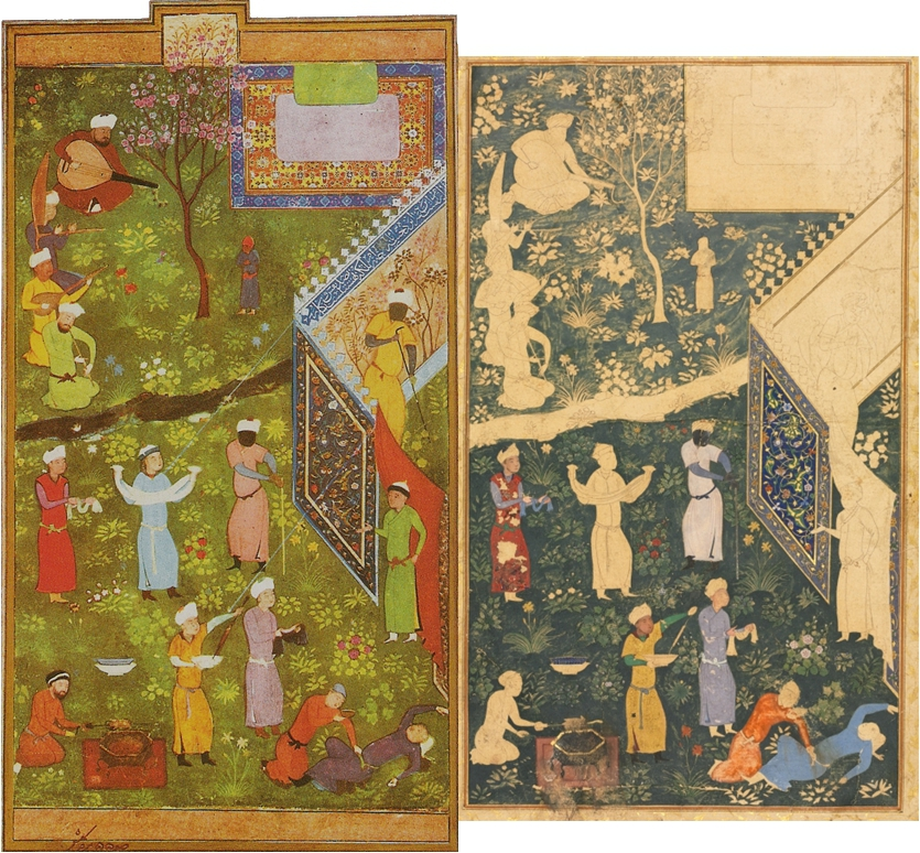 Links eine Miniatur von Behzād zu Muraqqa Gulshan, rechts eine unvollendte Kopie aus der Herater Werkstatt